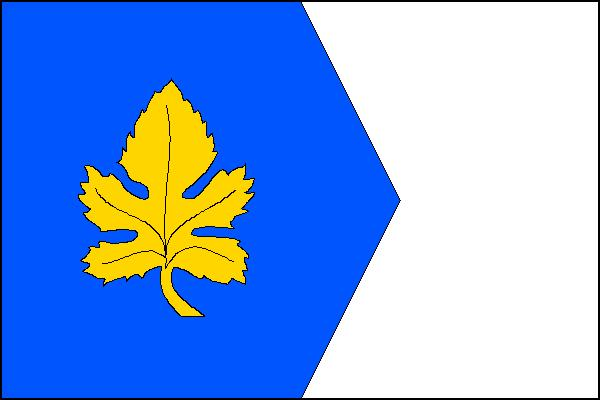 Vlajka obce Mělčany